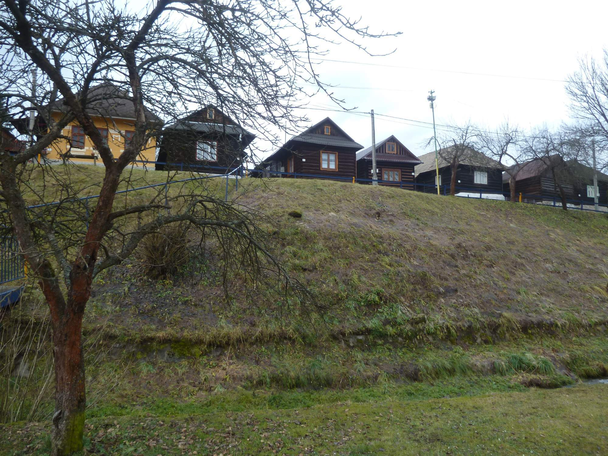 Starina, stred obce.